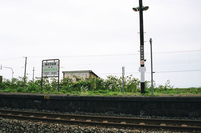 asahimaha